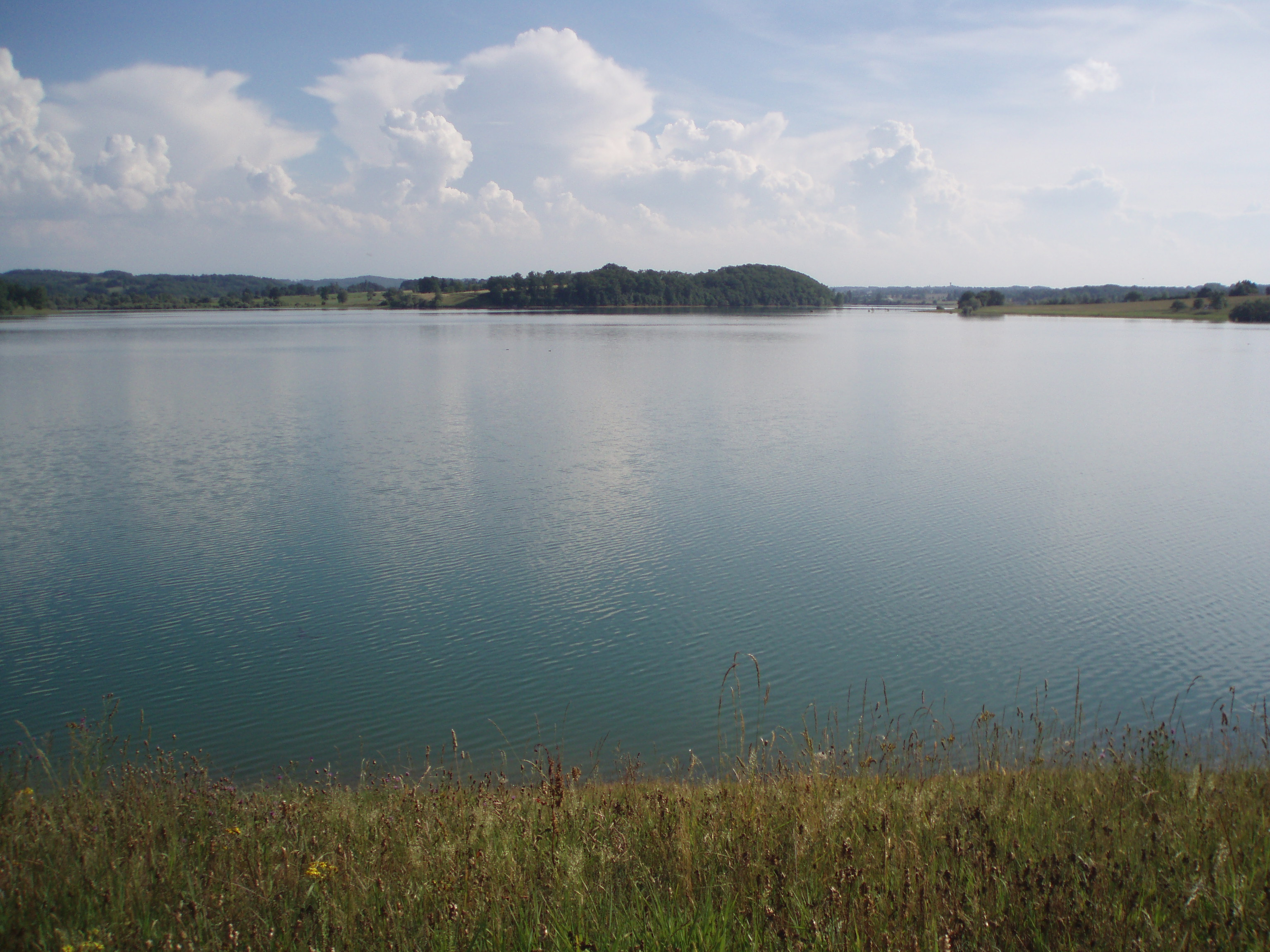 Le Lac de l'Astarac, vu depuis la digue